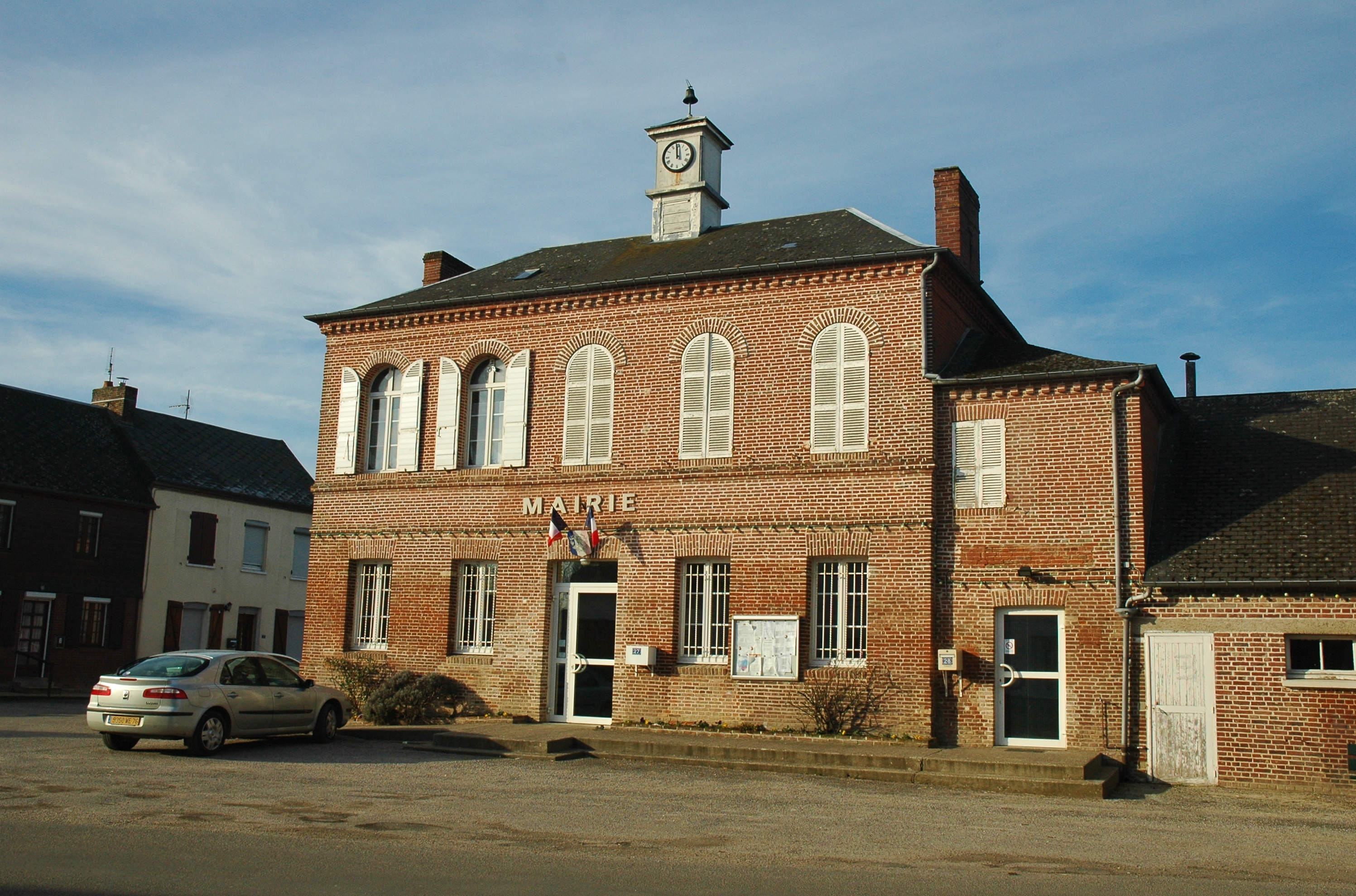 Grandcourt (Seine-Maritime, France). La mairie.